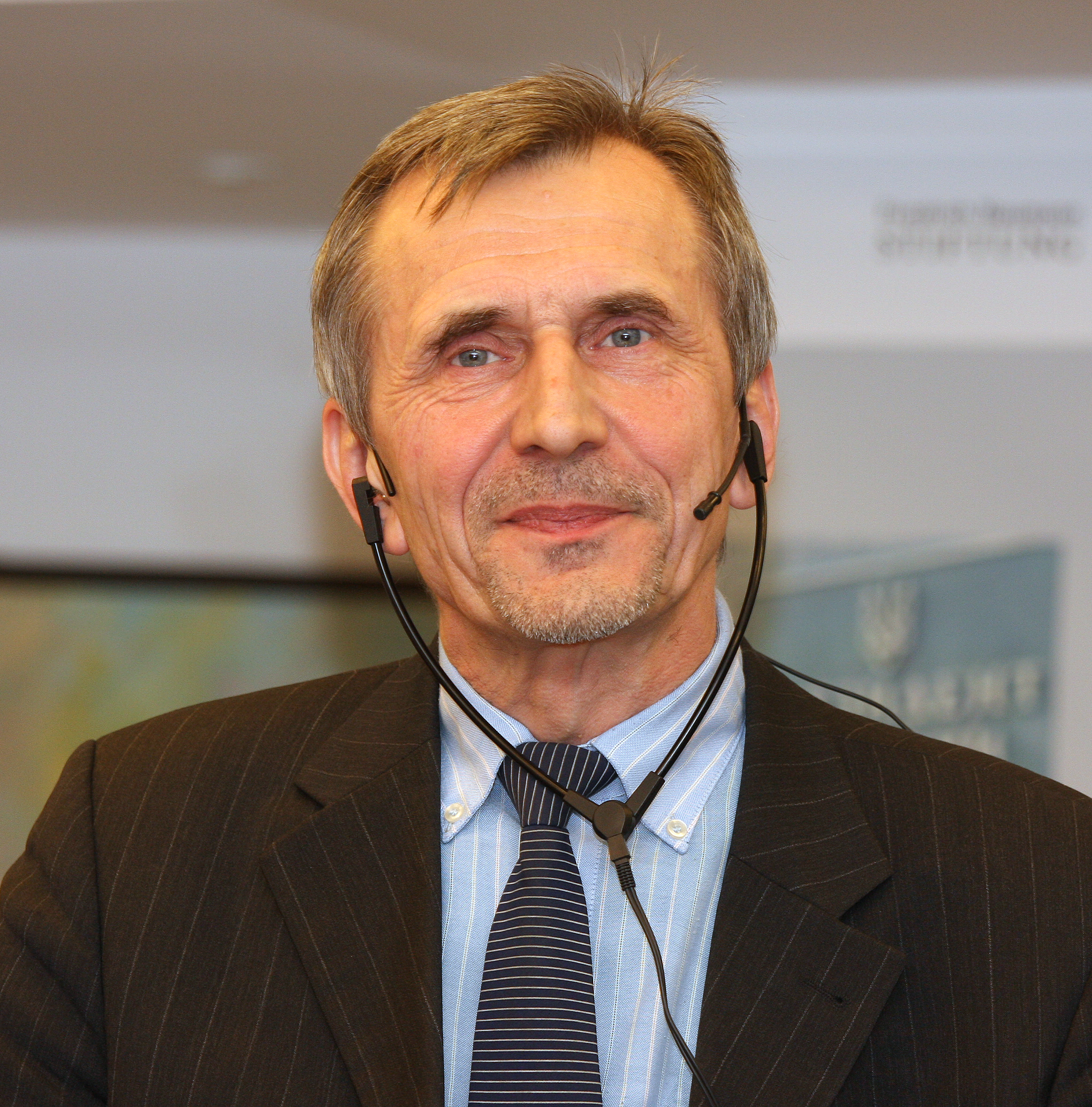 Mykola Rjabtschuk, ukrainischer Schriftsteller und Publizist, bei einer Veranstaltung in Köln im Dezember 2009